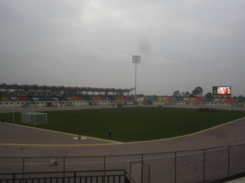 Football